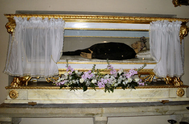 Barberino Valdelsa, Resti mortali di Sant'Appiano